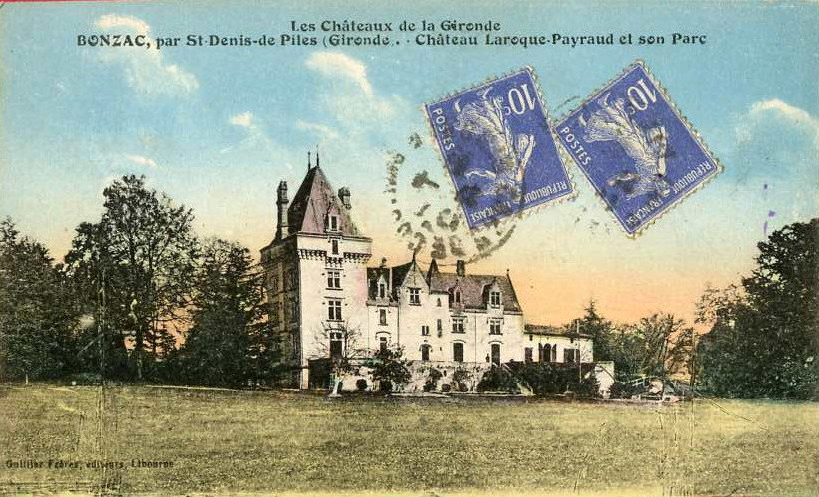 Bonzac on post-cards